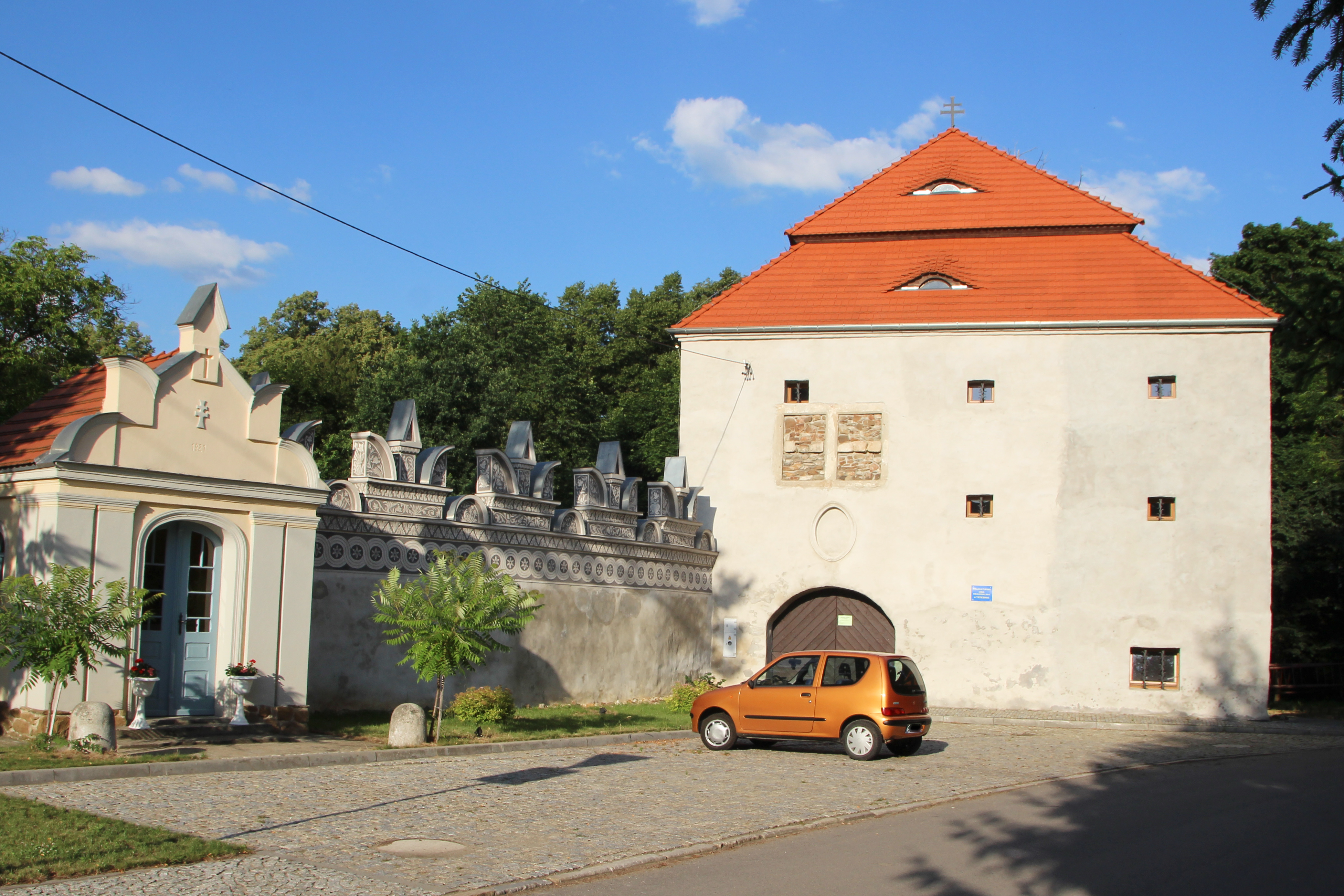 Trzebina - zespół zamkowy: budynek bramny z murem obwodowym, obecnie spichrz, pocz. XVII, XVIII